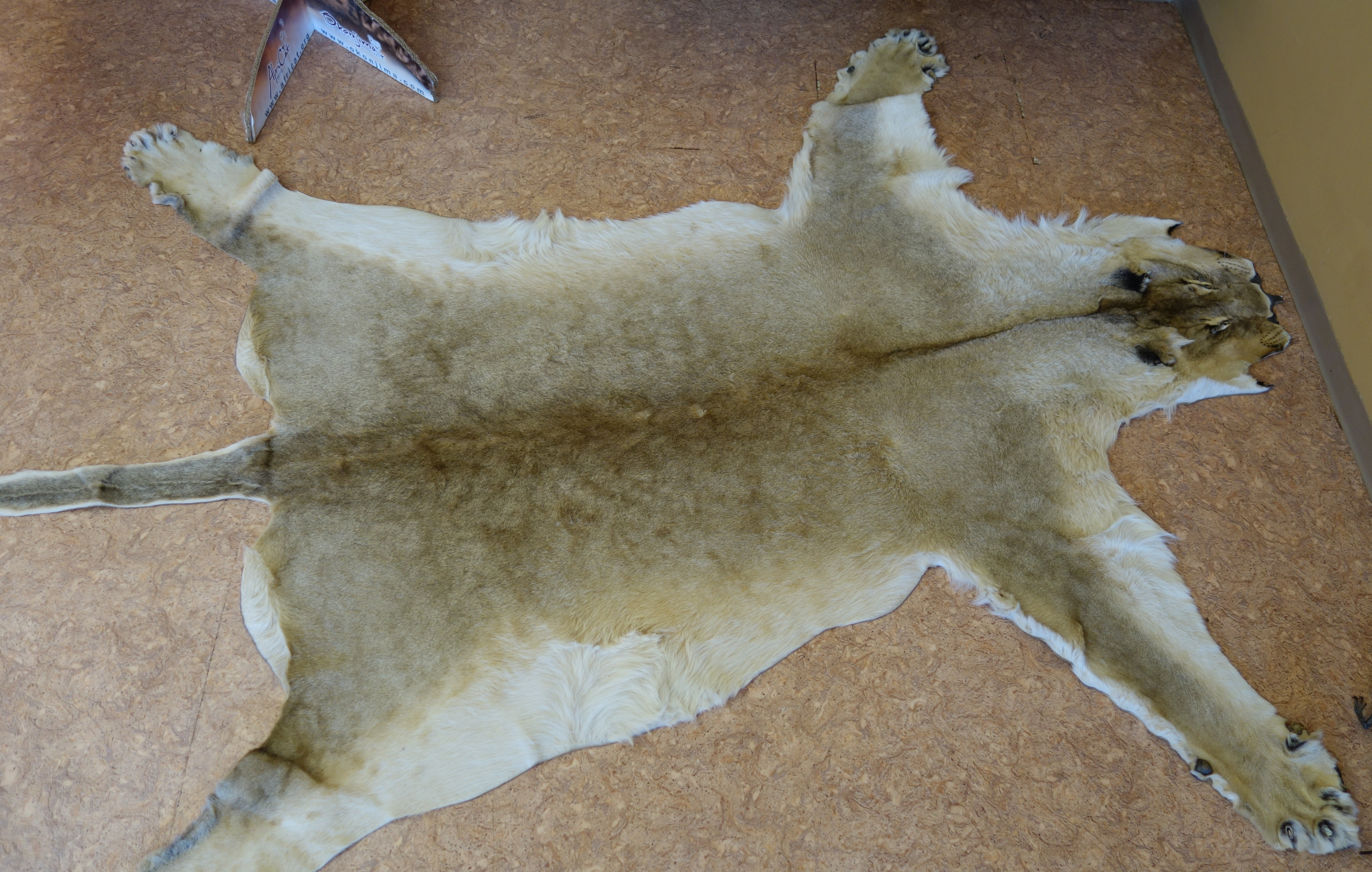 Namibia, Otjiwarongo, AfriCat-Stiftung. Löwinnenfell